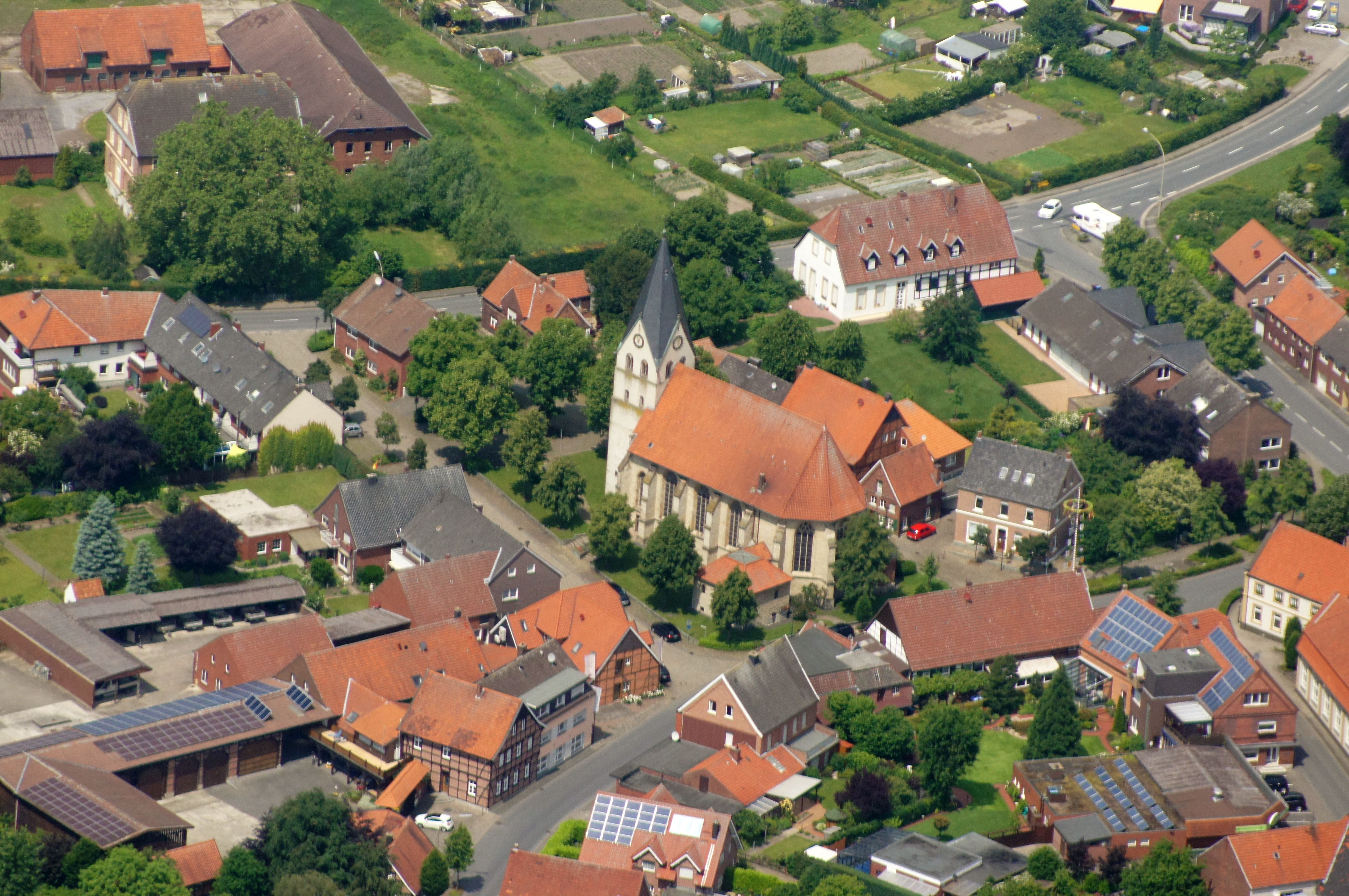 Luftaufnahme von Hoetmar, Stadt und Kreis Warendorf, NRW, mit der Kirche St Lambertus. Die Aufnahme entstand während des Münsterland-Fotoflugs am 1. Juni 2014. Hinweis: Die Aufnahme wurde aus dem Flugzeug durch eine Glasscheibe hindurch fotografiert.